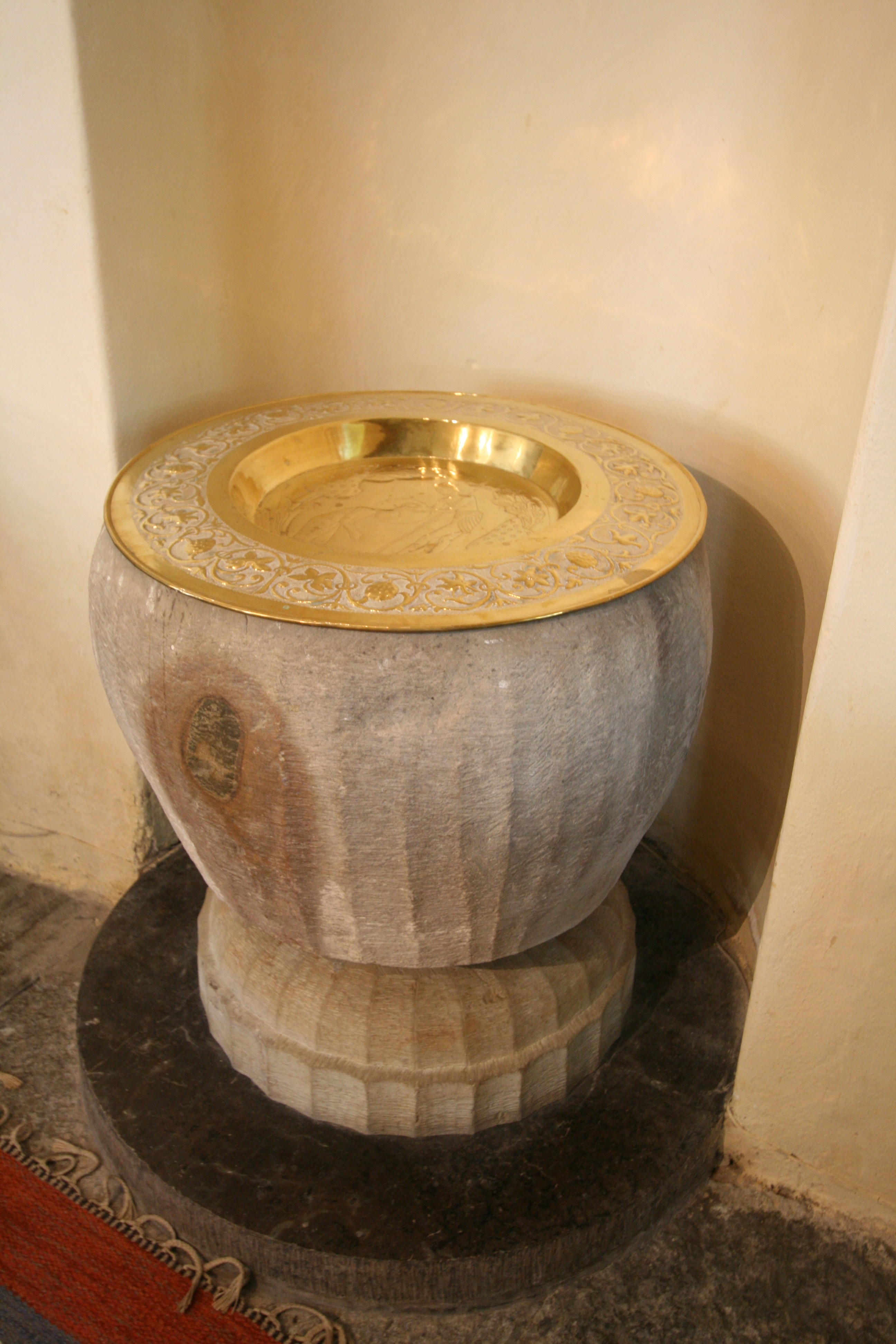 Den medeltida dopfunten i Vesene kyrka.